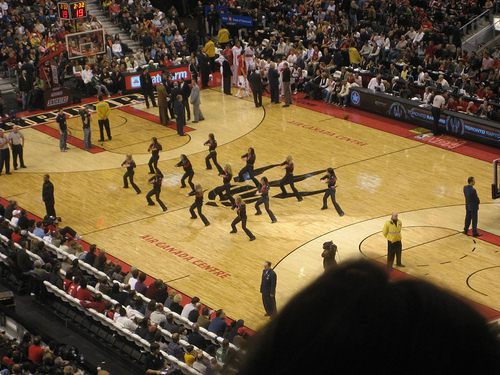 dance pak!